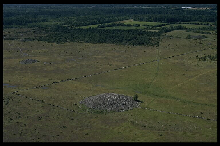 Motiv: Uggarderojr Nyckelord: Flygbilder, Riksintressen Kategori: Röse .